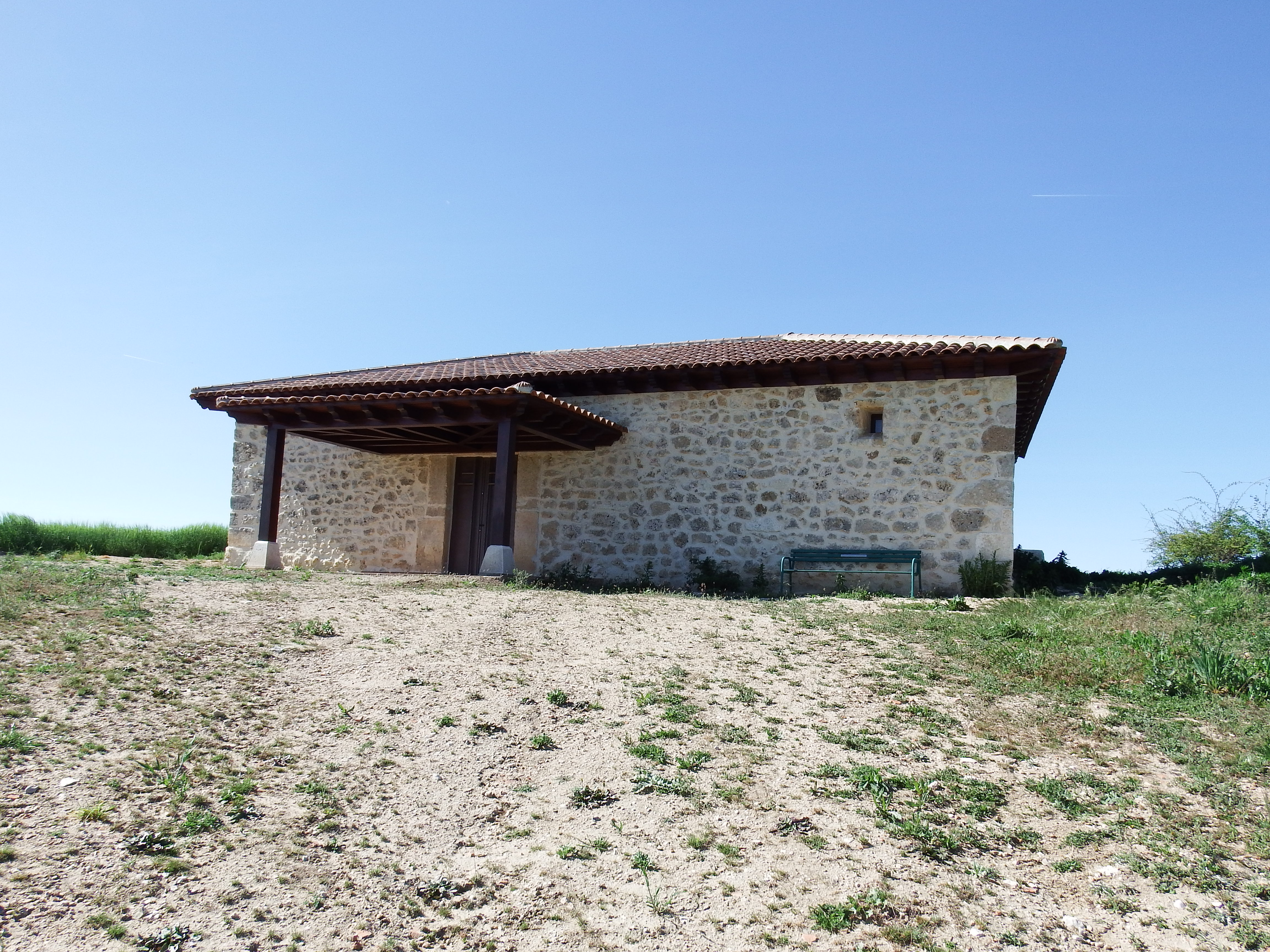 Ermita de la Virgen de Pinilla Trasmonte